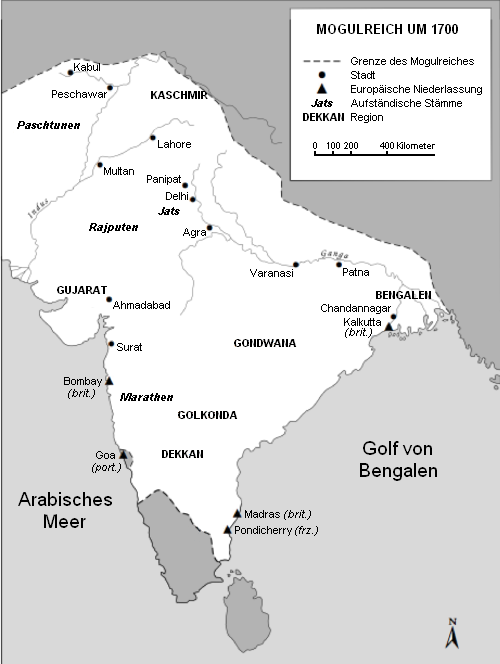 Karte des Mogulreiches um 1700 selbst erstellt